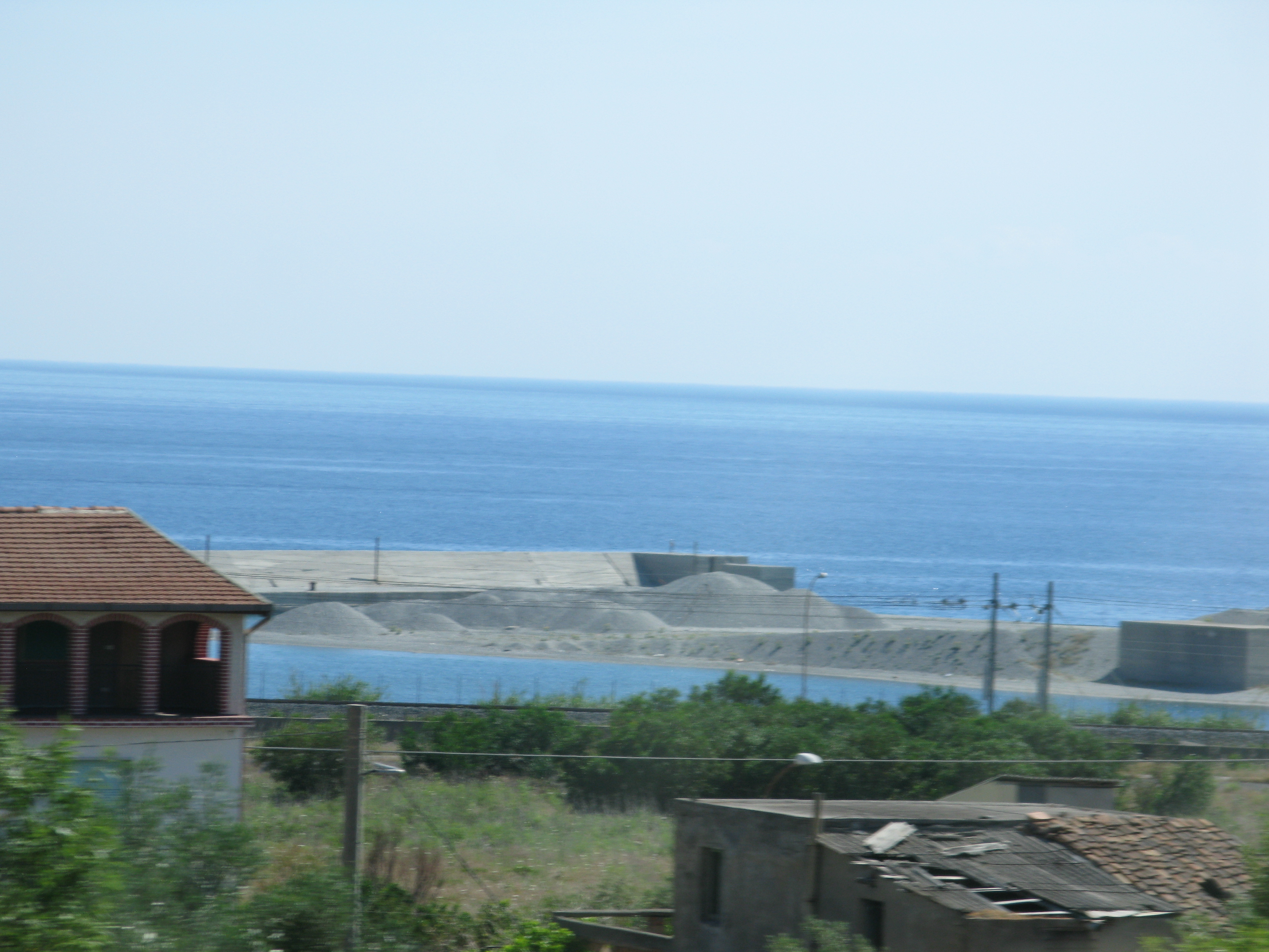 L'imboccatura, perennemente insabbiata a causa del gioco delle correnti, del Porto di Saline Joniche (Montebello Ionico)